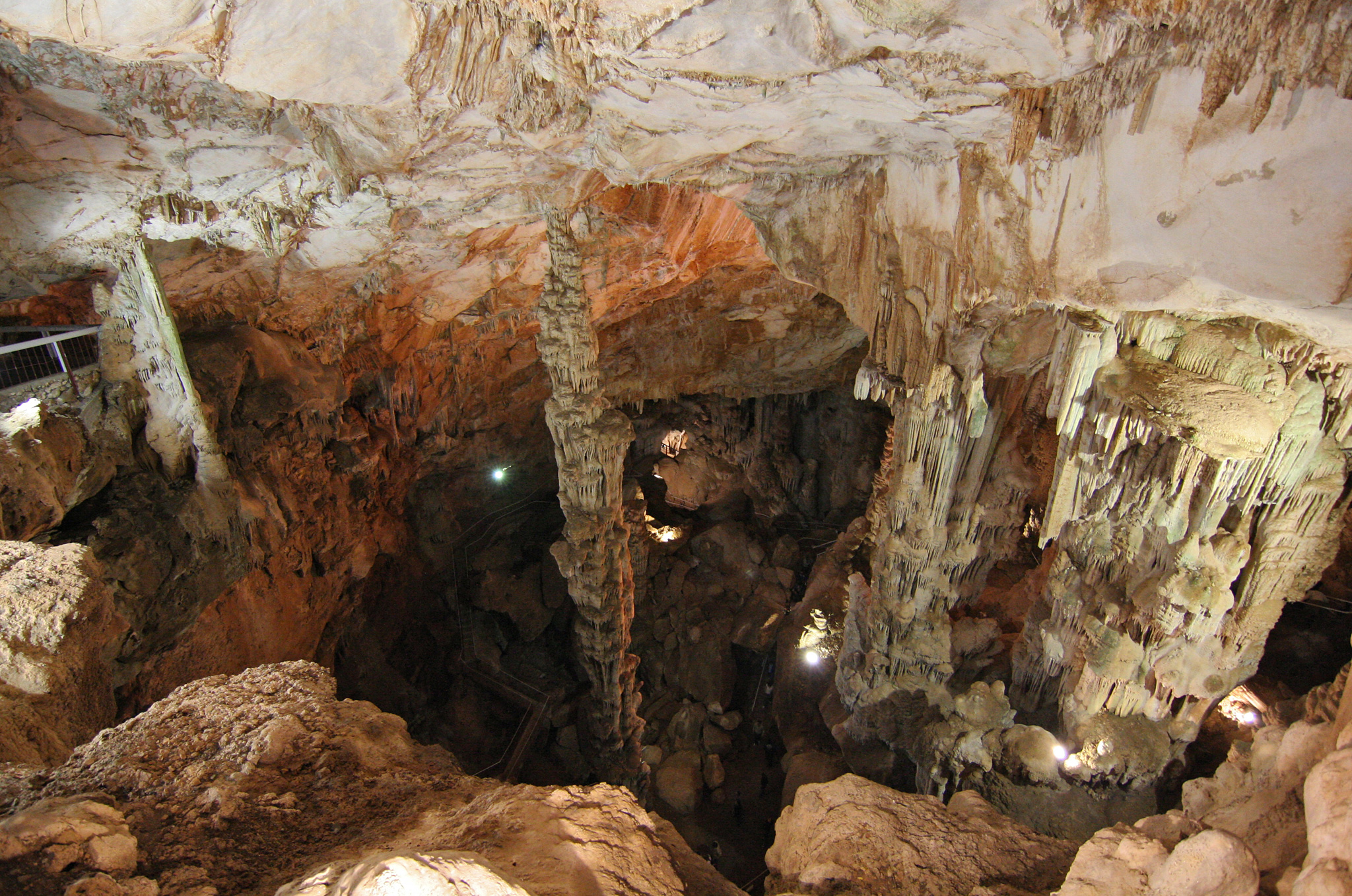 Grotta di Ispinigoli, Dorgali, Sardegna, Italia